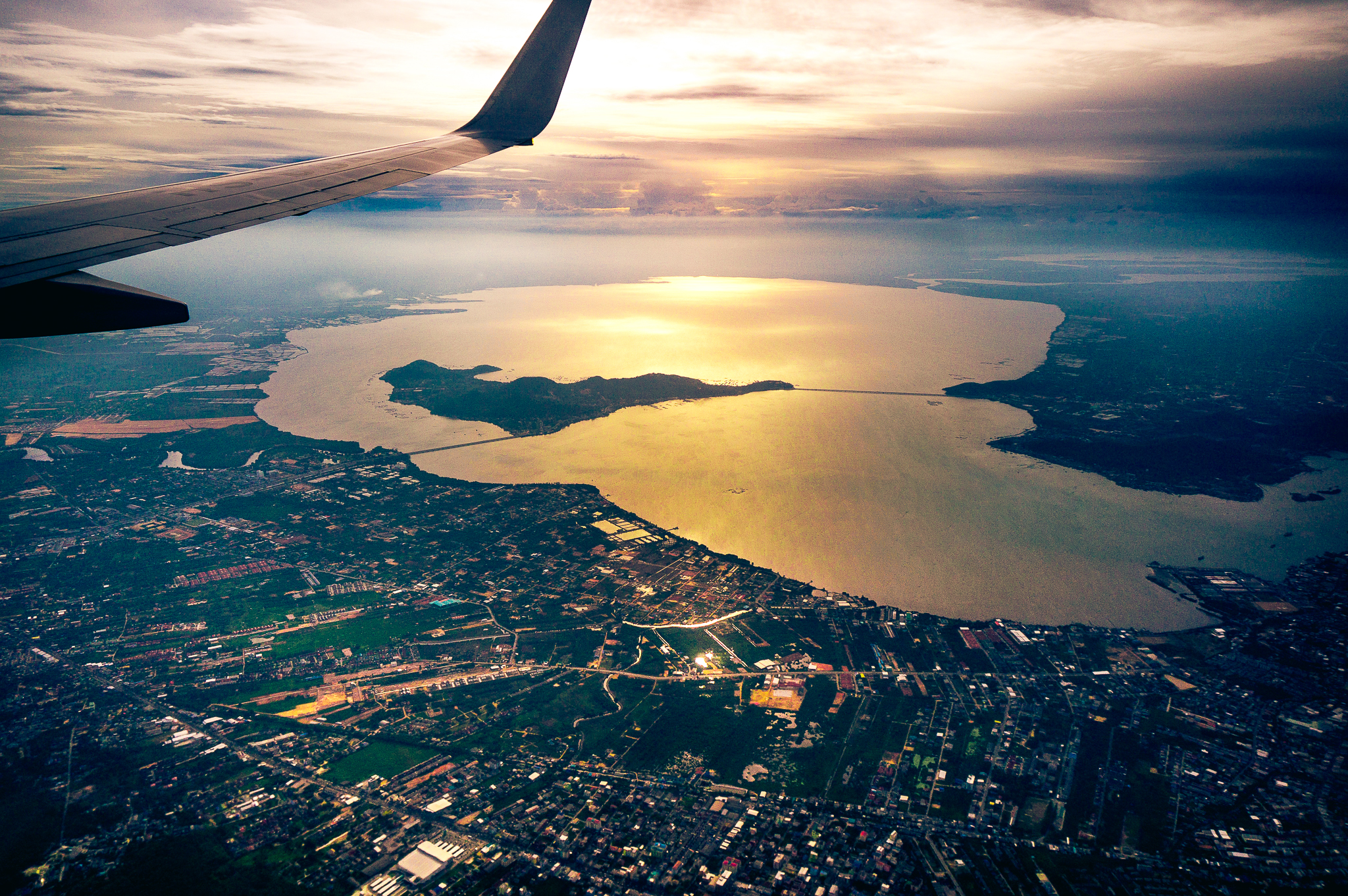 Songkhla 002